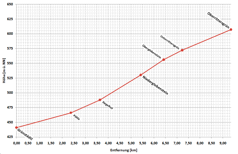 vereinfachtes Höhenprofil der Strecke Grünstädtl-Rittersgrün